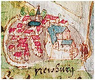 Neuburg am Rhein mit Burg. Ausschnitt aus der Kurpfälzischen Rheinstromkarte (1590-1600)